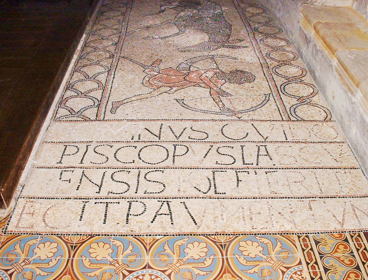 Foto de una parte del mosaico de la catedral de Lescar (Pirineos Atlánticos, Francia), antigua sede episcopal de la provincia de Bearn. La inscripción dice DOMINVS GVIDO EPISCOPVS LASCVRENSIS HOC FIERI FECIT PAVIMENTVM y hace referencia al fundador de la catedral, Guido de Lons.